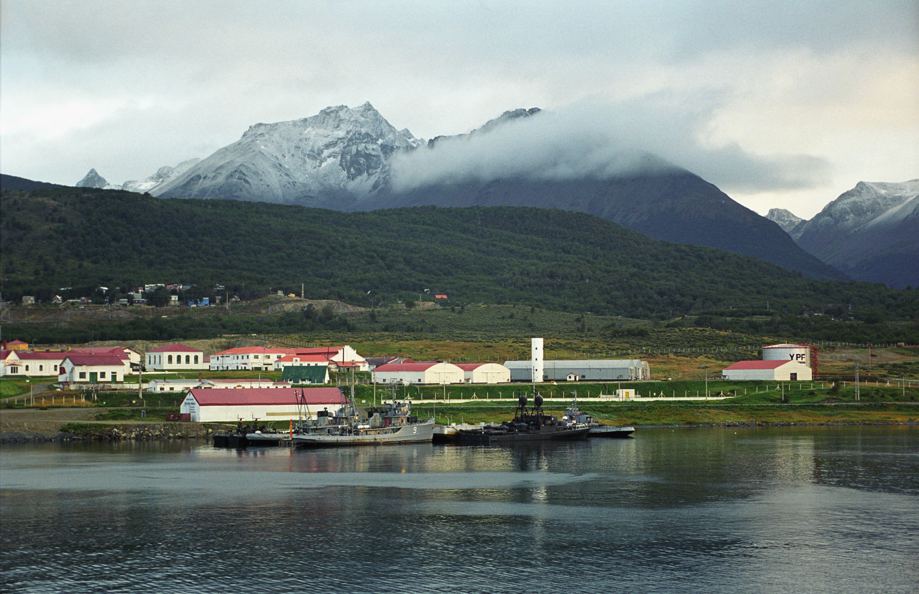 Ushuaia, military harbour